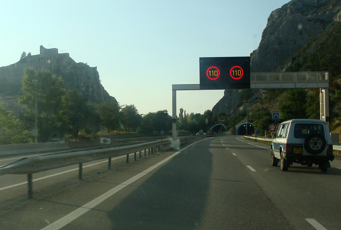 L'autoroute A 51 à l'approche de la cluse de Sisteron, côté sud. A gauche la citadelle de Sisteron ; à droite le tunnel de la Baume.